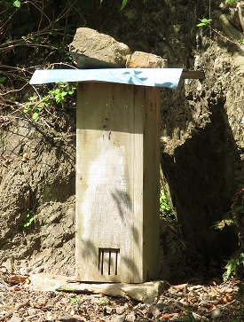 対馬全島で見られる二ホンミツバチの巣箱「蜂洞」（はちどう）